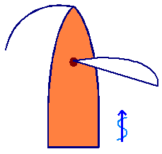 Voor de windse koers met zeil over stuurboord.